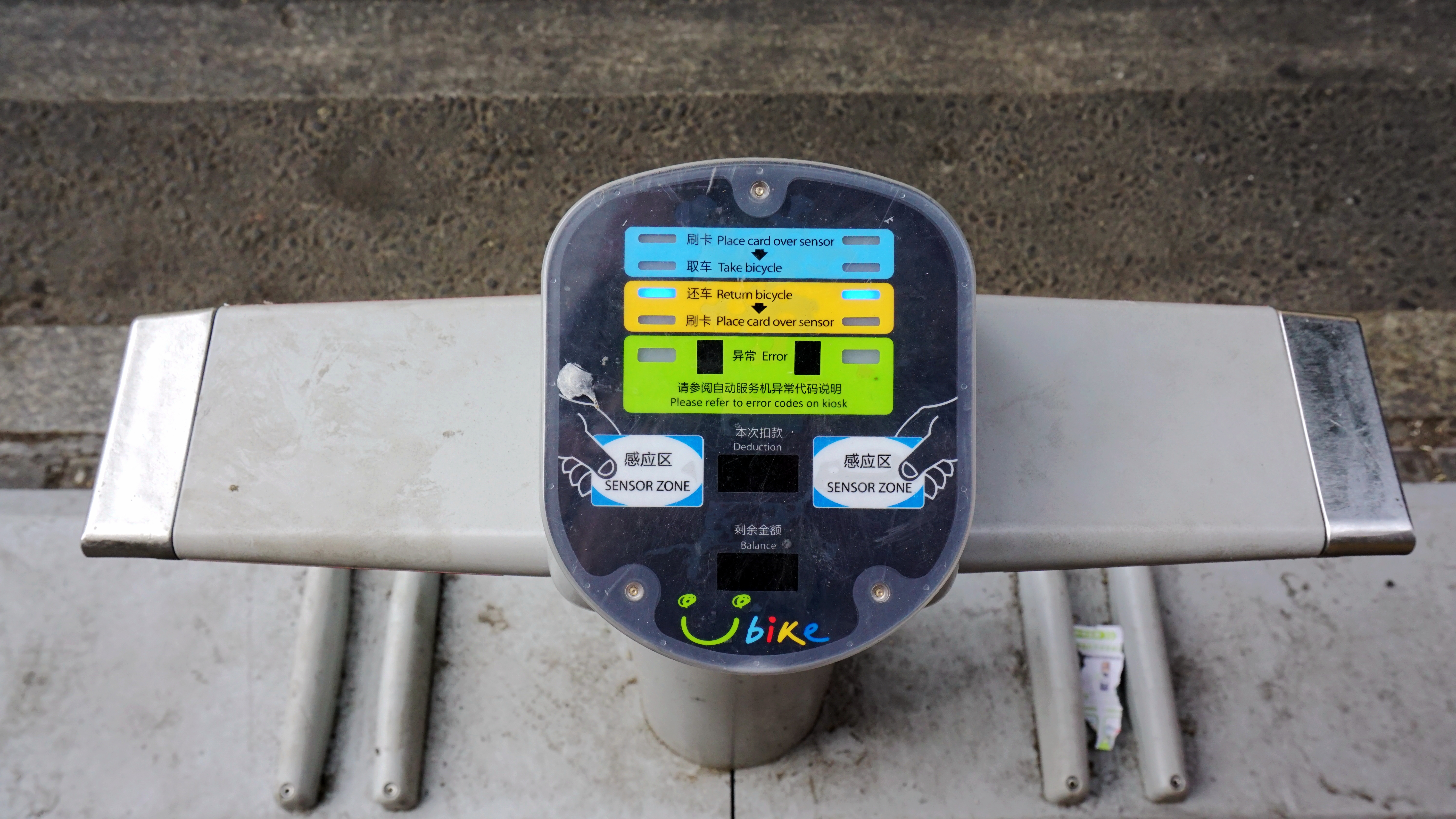 车辆锁车柱